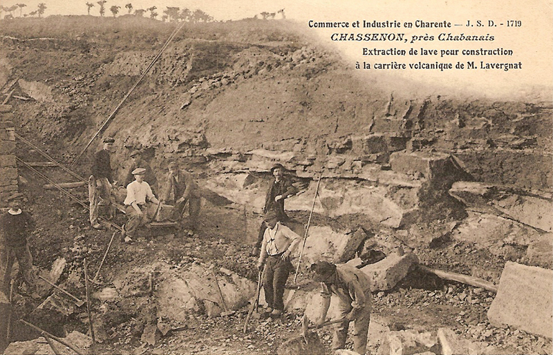 Carte postale ancienne montrant le front de taille de la carrière de M. Lavergnat où l'on exploitait de la « lave volcanique » pour la construction. On distingue bien les couches de brèches générées par l'impact de l'Astroblème de Rochechouart-Chassenon. Nous sommes à cet endroit quasiment au centre du cratère. D'après l'image, la « lave », c'est à dire la roche de couleur claire, devait être constituée de brèche vitrifiée particulièrement homogène, ainsi qu'on peut le voir sur le bloc dans le coin inférieur droit de la photo. Contents 1 Auteur 2 Licensing 3 Licensing 4 Original upload log Auteur Photo des ateliers J.S.D., n° 1719, datée à environ 1910 (carte issue de la collection de M. Renaudeau). Licensing Selon l'art. L123-3, pour une œuvre pseudonyme, anonyme ou collective, le délai de 70 ans après lequel les droits sont échus court à compter du 1er janvier de l'année civile qui suit la date à laquelle l'œuvre a été publiée. Cette carte postale est datée des environs de 1910 et a été publié sous le pseudonyme « JSD ». Ce « JSD » a diffusé des cartes jusqu'en 1928. Les droits sont donc arrivés à leur terme en 1980, ou au plus tard en 1998. Cette image à fait l'objet d'un arbitrage qui a décidé de sa conservation. Le suivi des débats peut-être consulté sur cette page : Wikipédia:Images à supprimer/Image:Chassenon-Extraction de lave pour construction à la carrière volcanique de M. Lavergnat.jpg